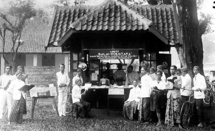 Repronegatief. Kiosk van "Balai Poestaka" te Poerwokerto.